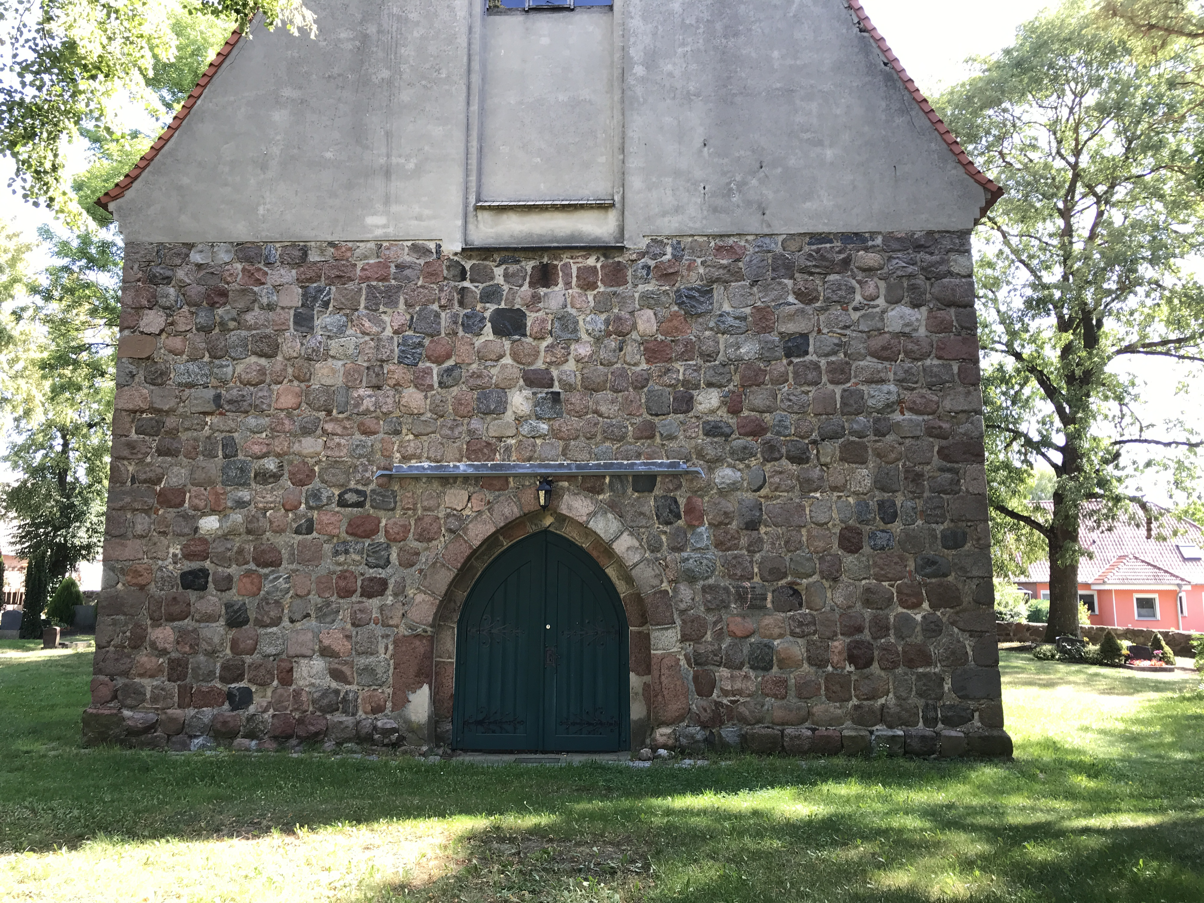 Die Kirche Groß Luckow ist eine Feldsteinkirche aus dem 13. Jahrhundert in Groß Luckow, Landkreis Vorpommern-Greifswald in Mecklenburg-Vorpommern. Im Innern steht unter anderem ein Altarretabel aus dem Jahr 1623.